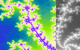 Detaljbild från fraktalen mandelbrotmängden.